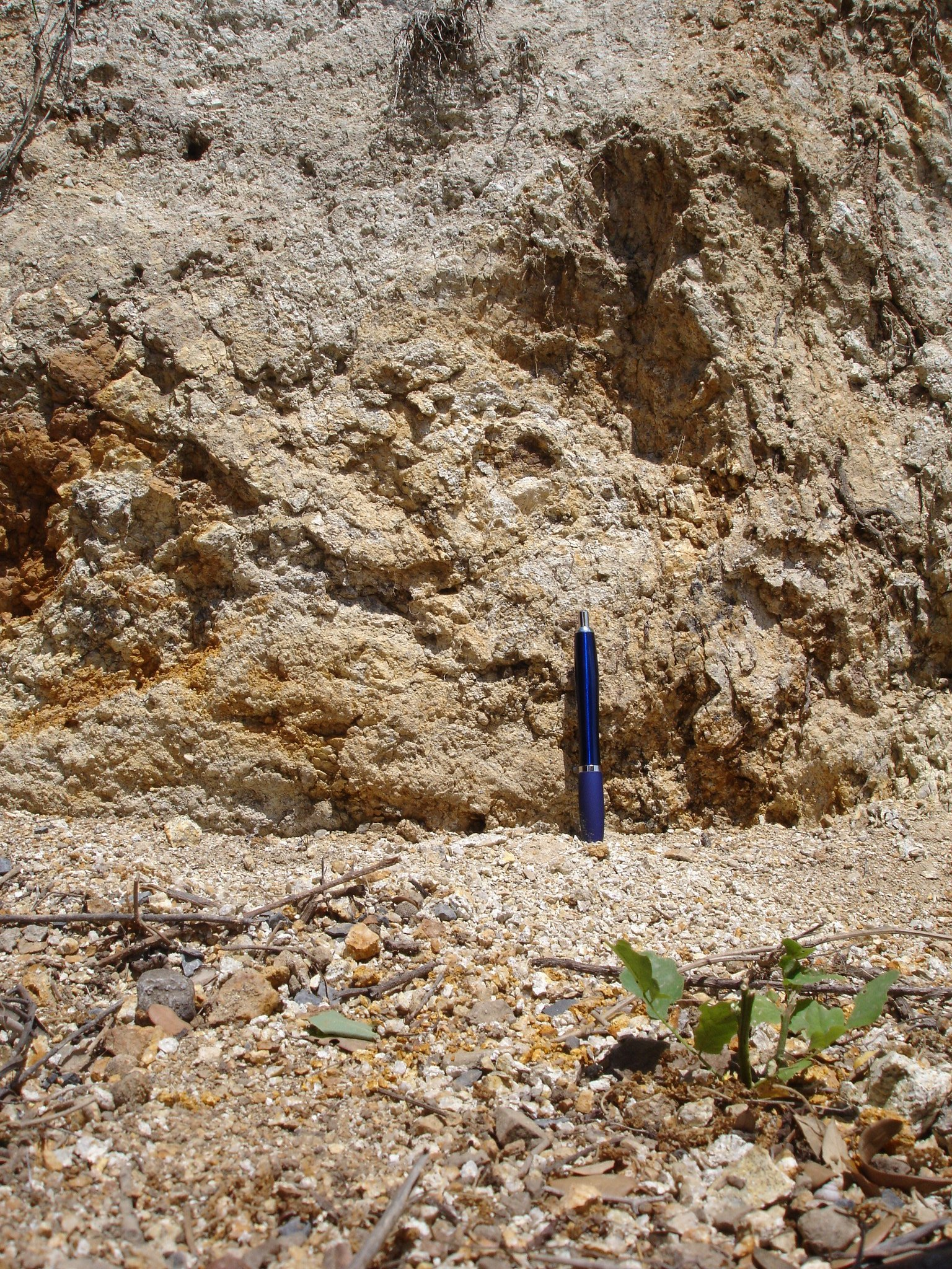 France, Pyrénées-Orientales (66), chaos de Targassonne près de Font-Romeu-Odeillo-Via - Granite pourri et arène granitique